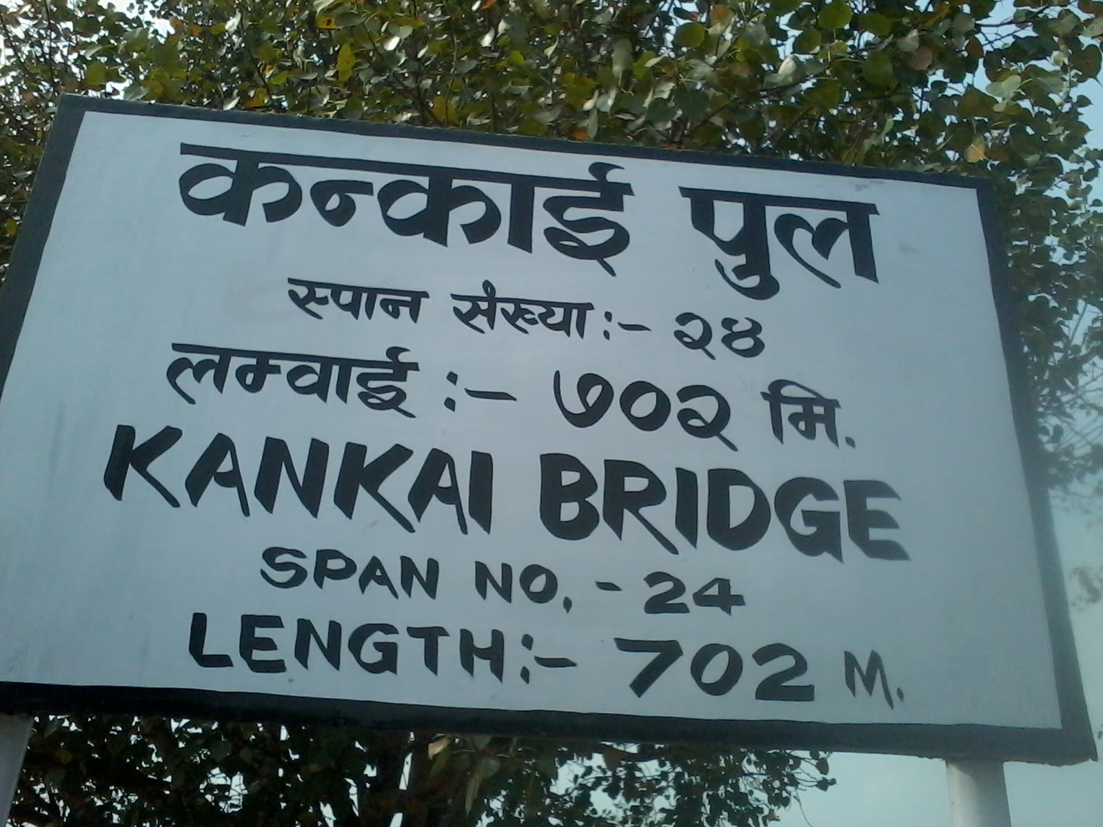 कन्काई नदीमा बनेको पुलको विवरण